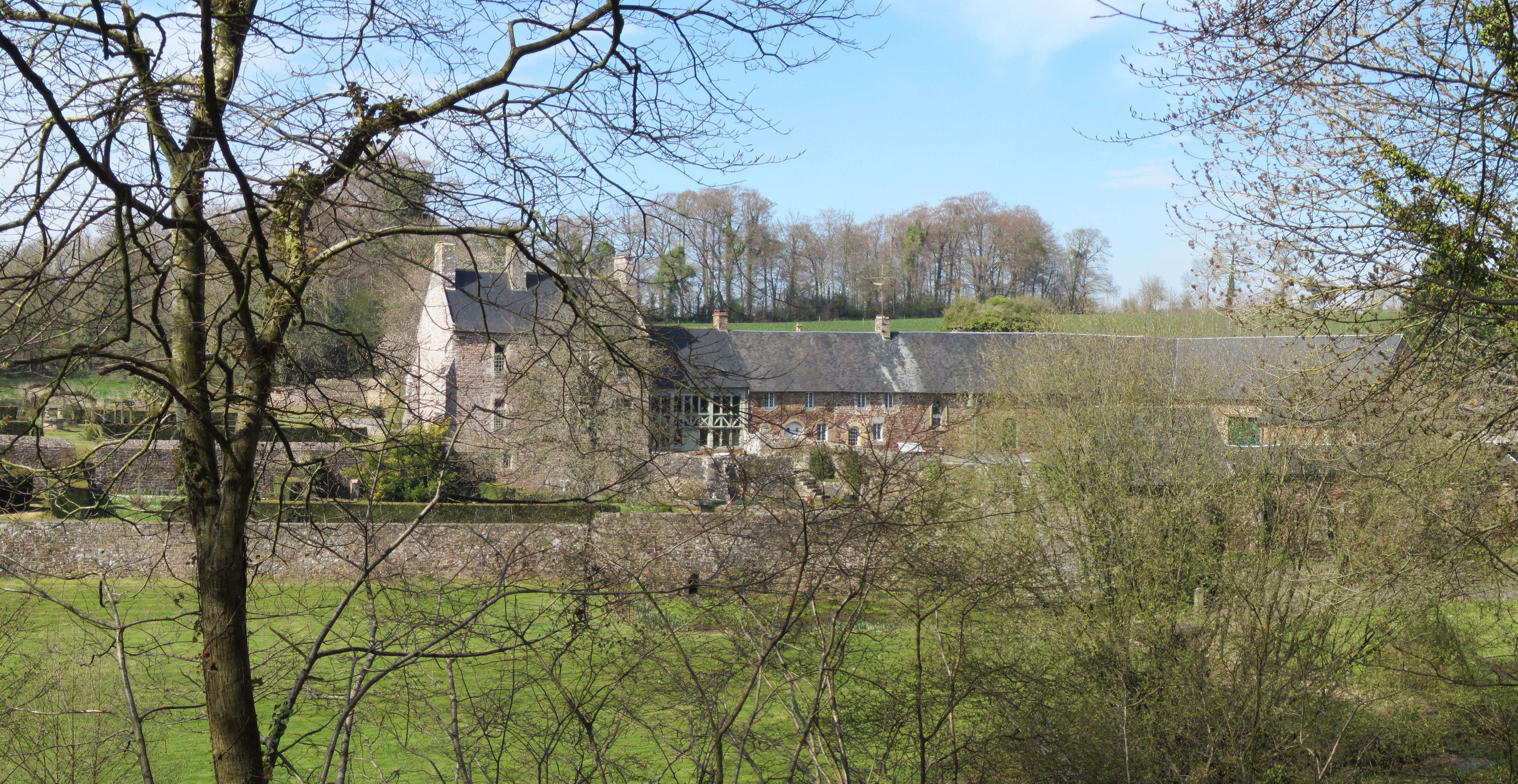 Prieuré de l'Oiselière, Saint-Planchers Ancien prieuré de l'abbaye du Mont-Saint-Michel. .